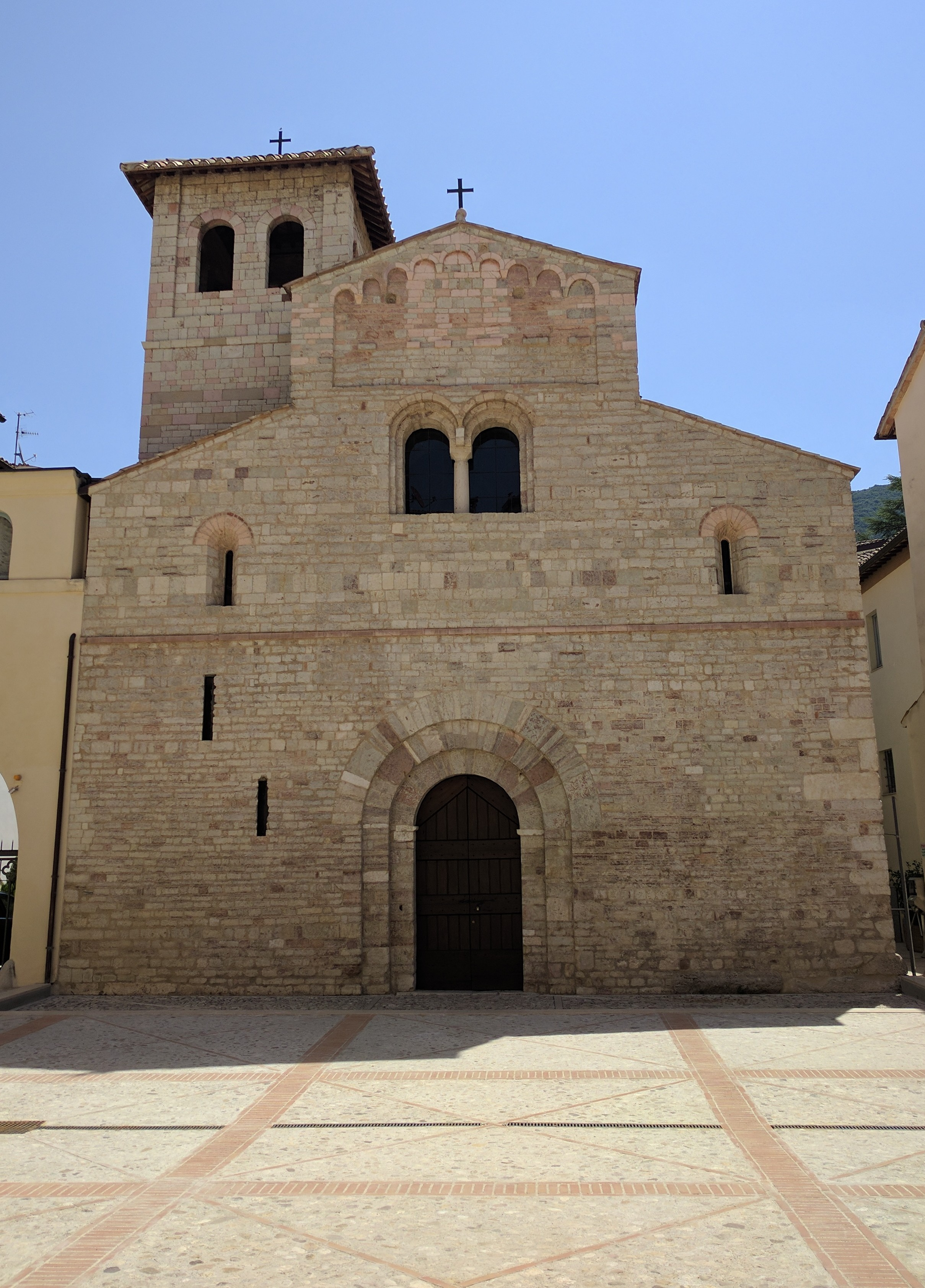 Facciata della chiesa di Sant'Eufemia di Spoleto